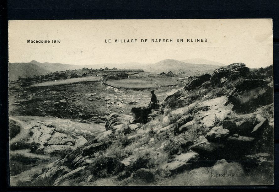 Руините на Рапеш по време на Първата световна война